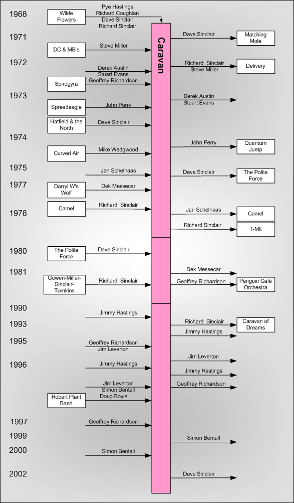 Bezettings wijziging van de band Caravan. zie Caravan (band) eigen werk